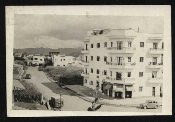 Caracas Avenidacasanova-1947-de-Oeste-a-Este2